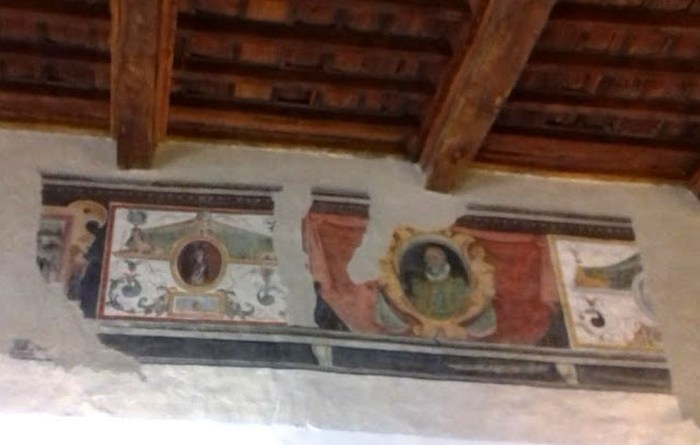 Fregio Affrescato